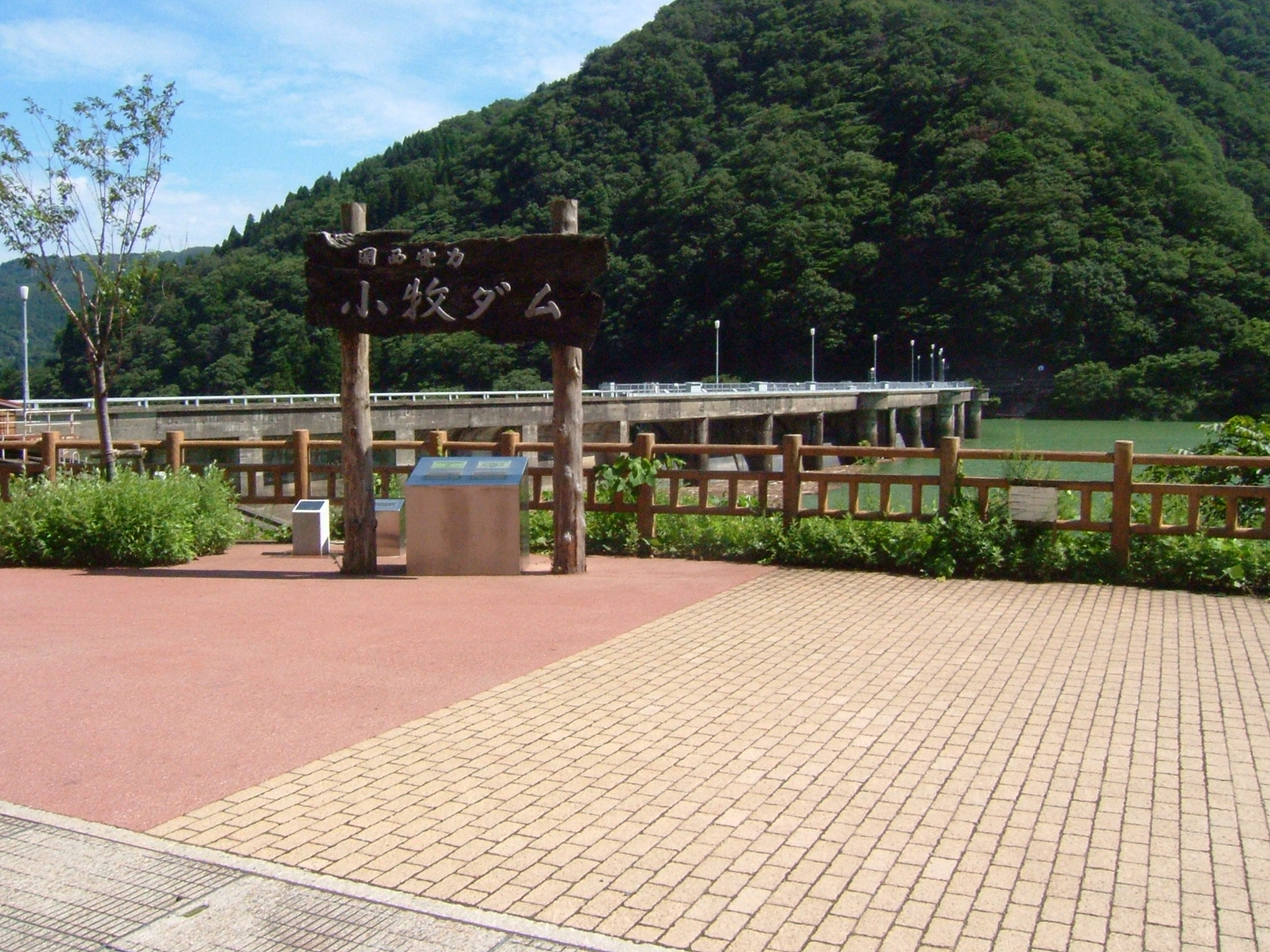 小牧ダムのダムサイト。関西電力が管理していることが記されている。